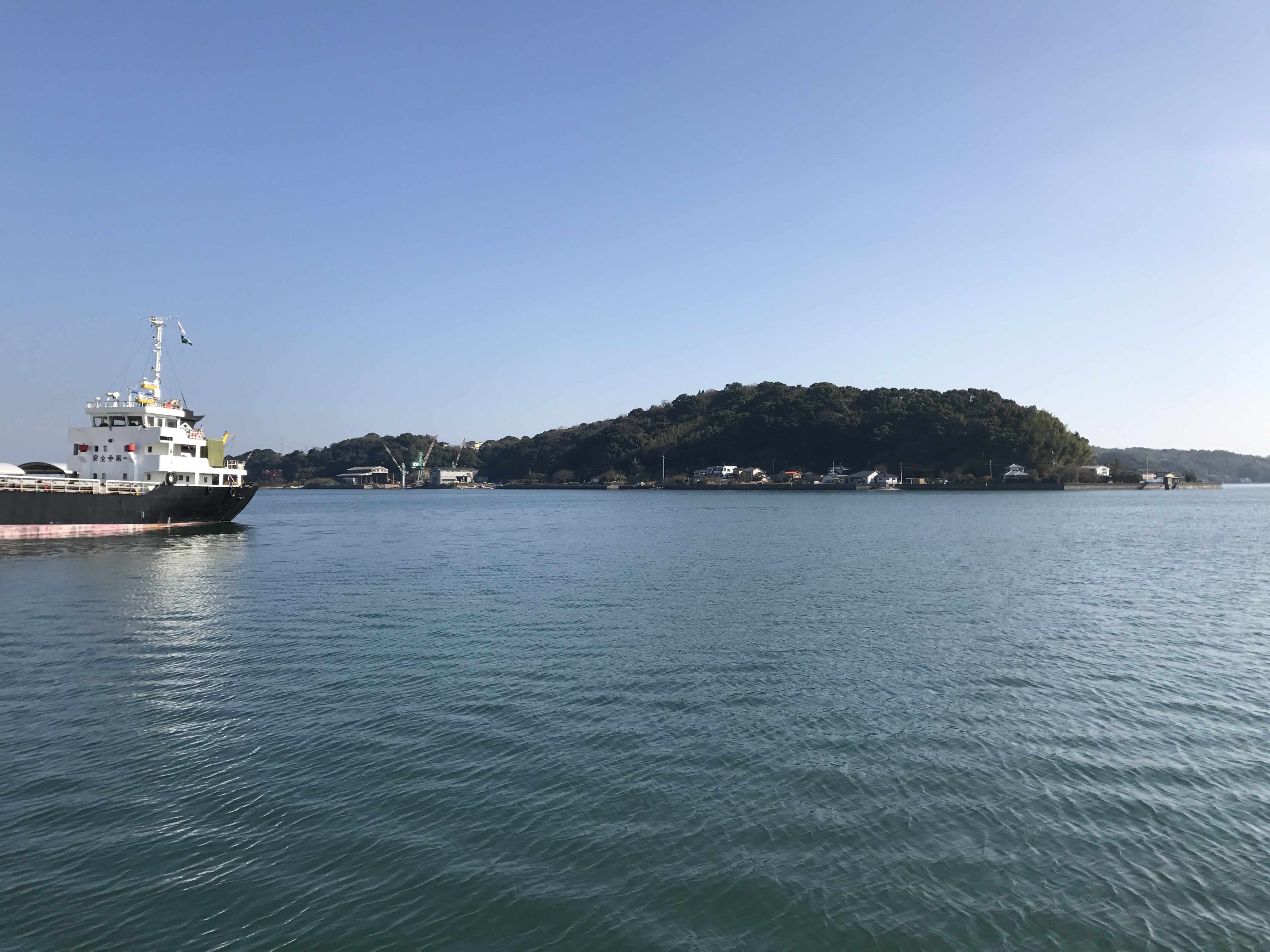 三角東港より望む戸馳島